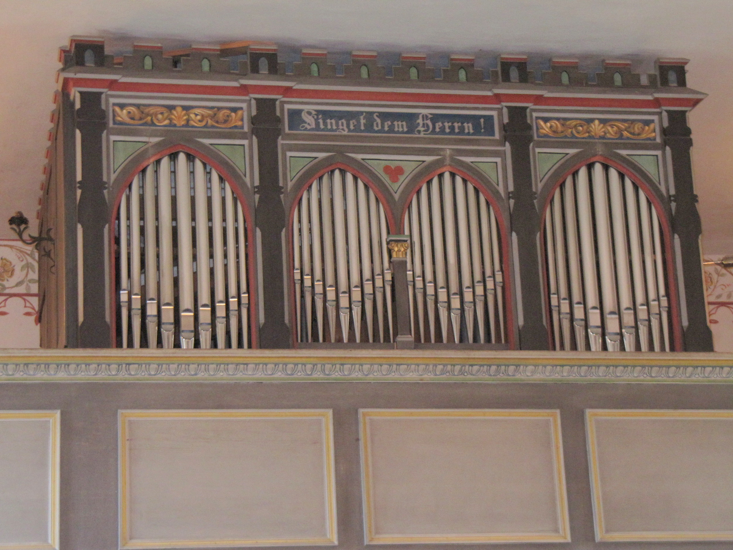 die orgel in der dorfkirche gortz